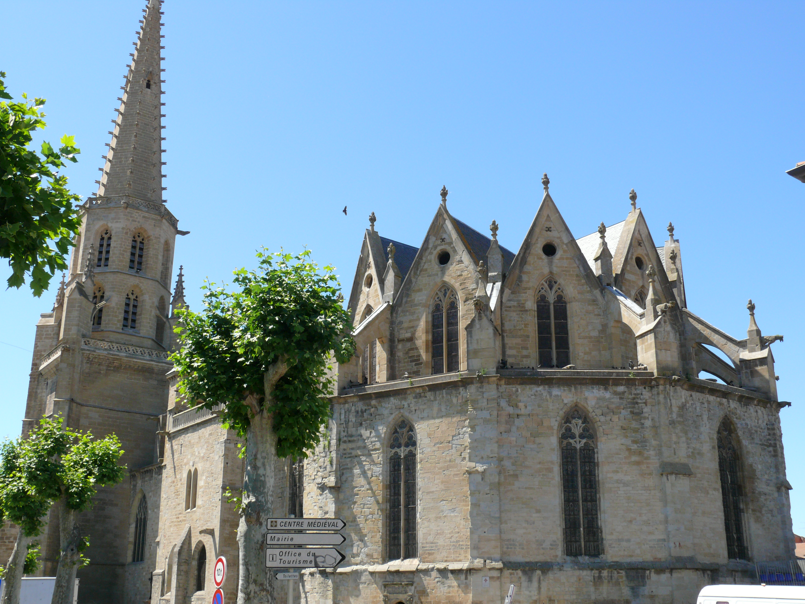 Mirepoix - Ancienne cathédrale - Chevet